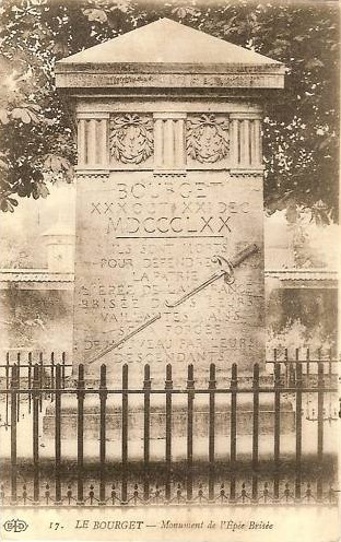 Carte postale ancienne représentant le monument aux morts du Bourget, appelé l'épée brisée en hommage aux Bourgetins mort en 1870.